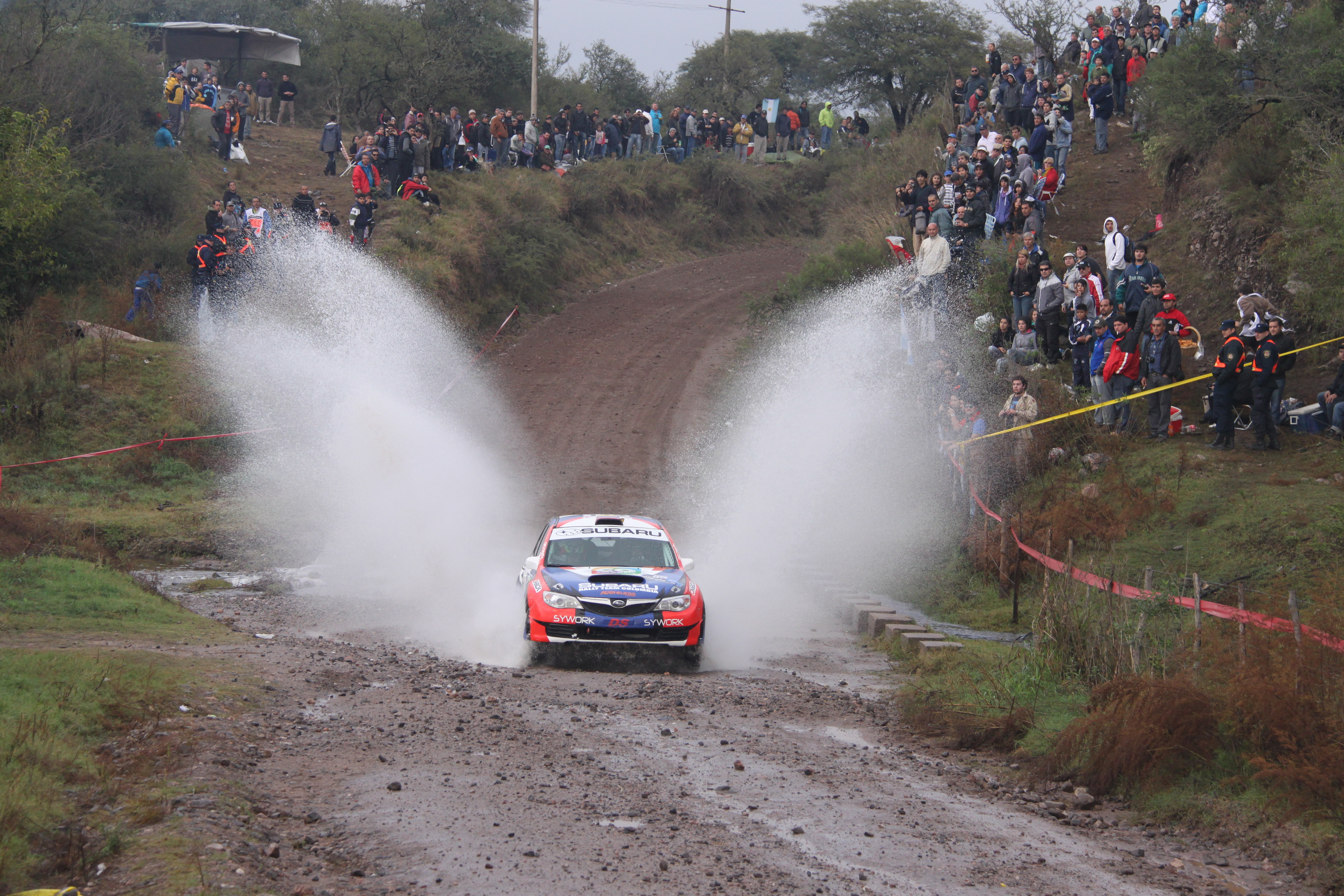 Nicolás Bedoya Copa ACA - Rally Argentina 2013